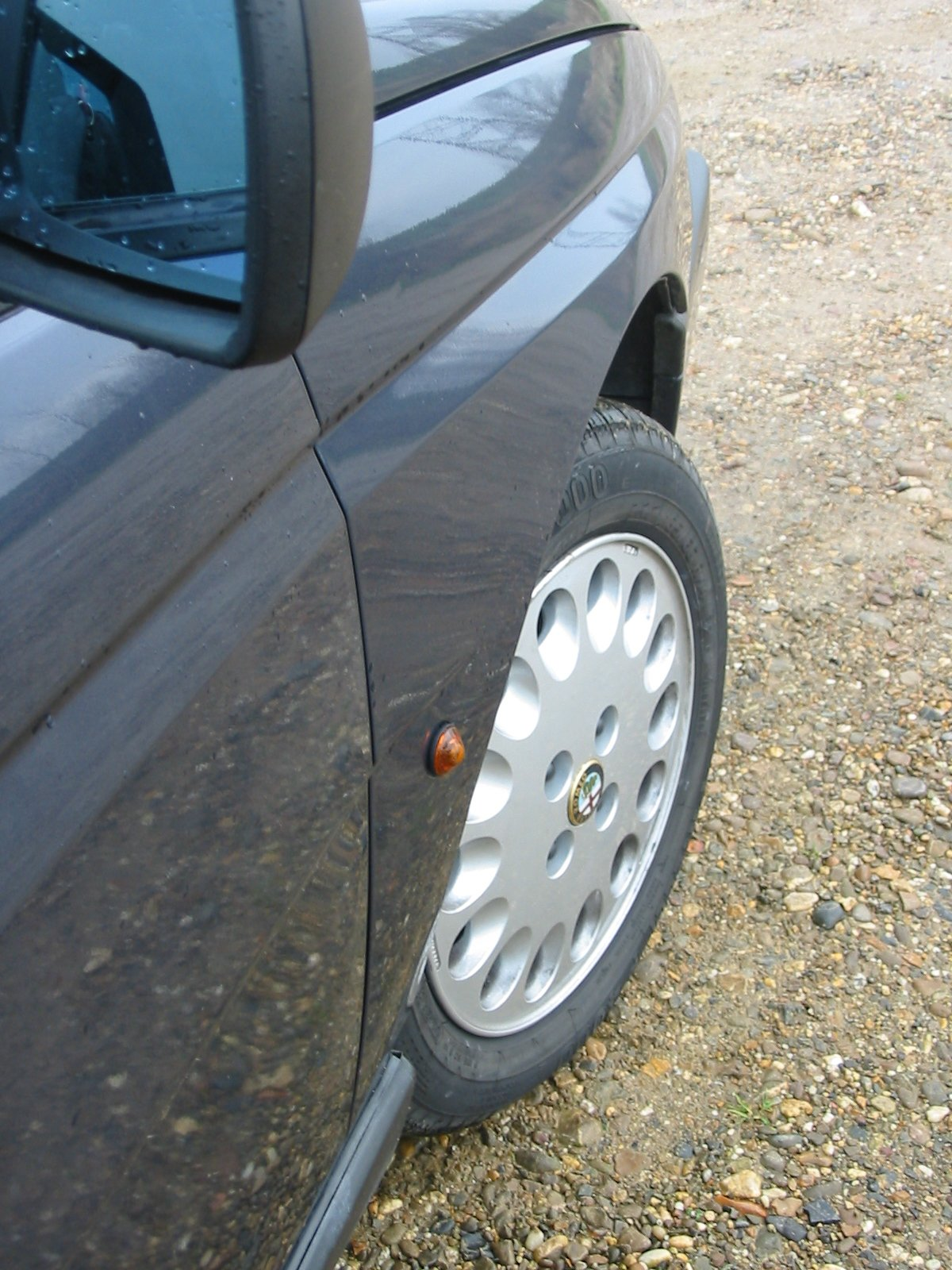 Alfa Romeo 155 Widebody